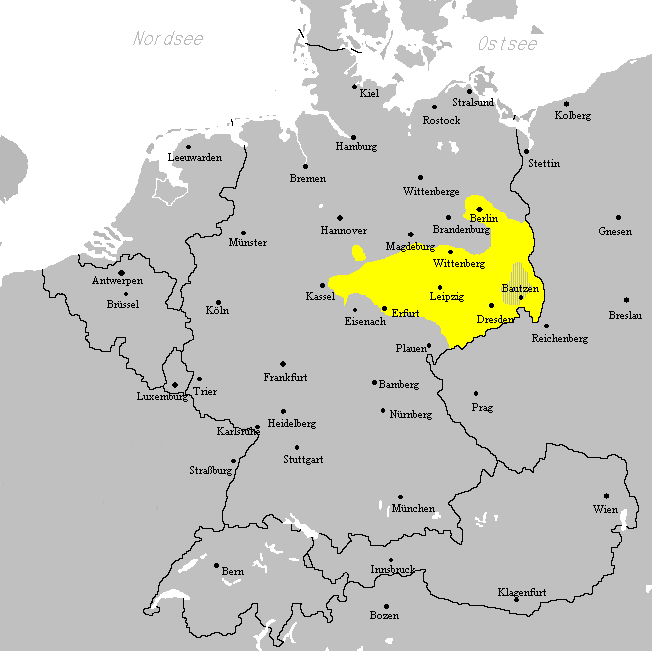 Verbreitungsgebiet der ostmitteldeutschen Mundarten Beschreibung: Darstellungskarte mit dem Verbreitungsgebiet des Ostmitteldeutschen seit 1945. Zeichner: Postmann Michael erstellt am: 31. Dezember 2004 Lizenzstatus: Public Domain